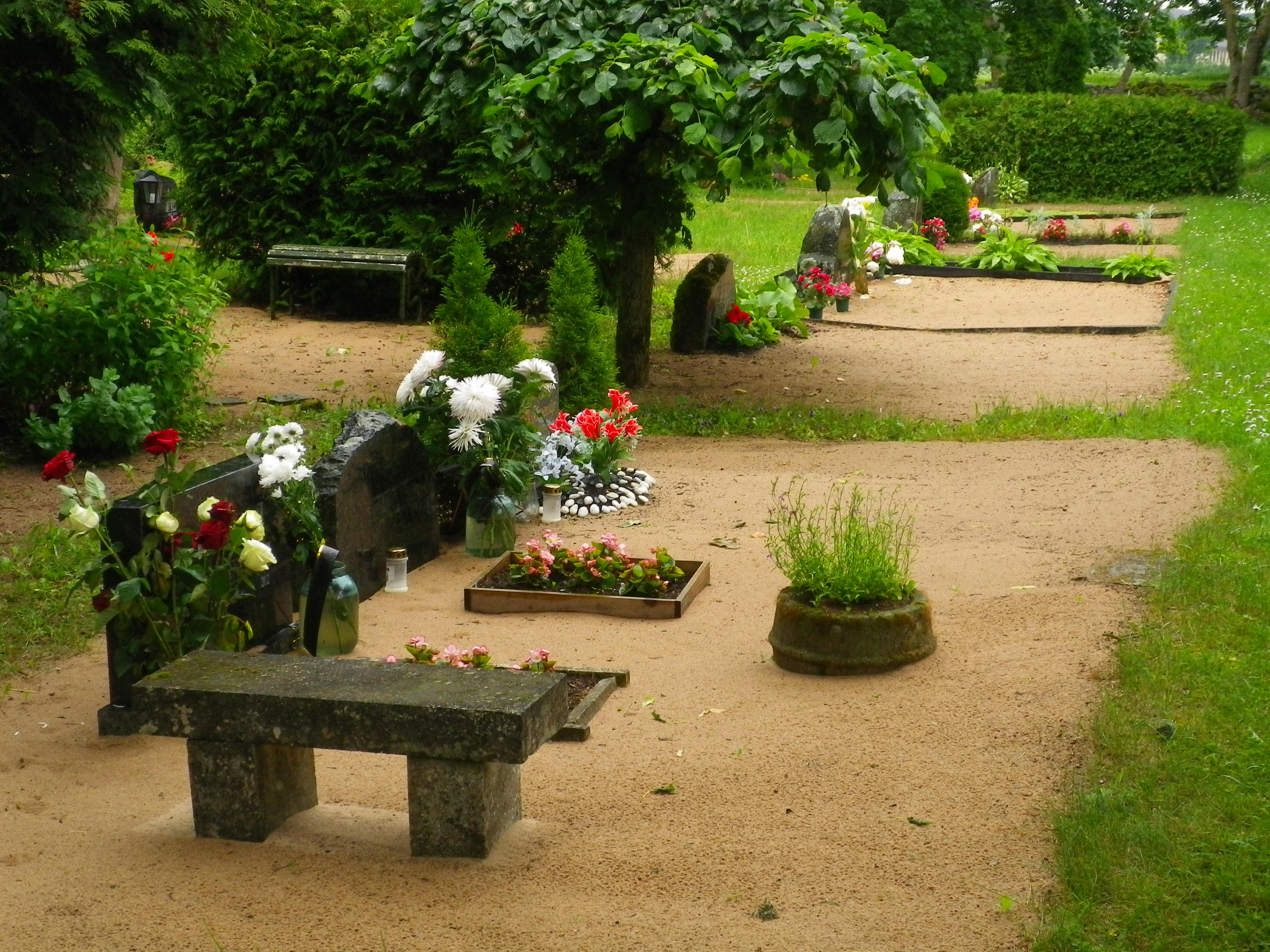 Karja kalmistu, SaaremaaEesti: Karja cemetery, Saaremaa, Estonia